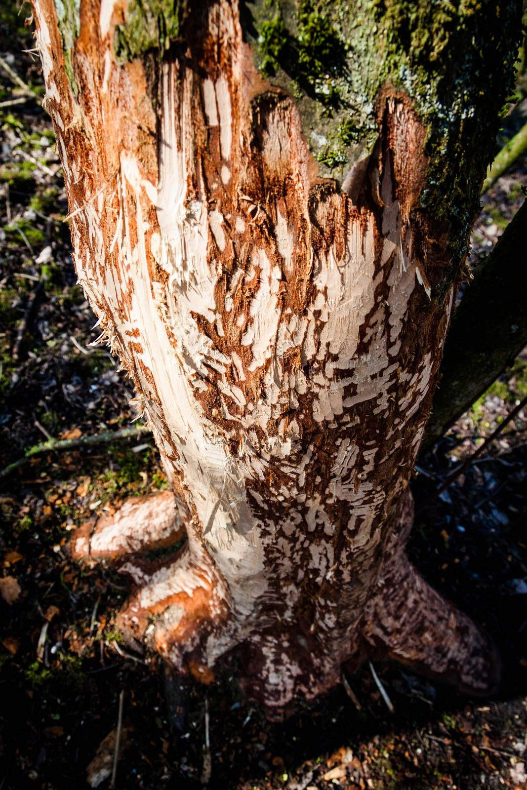 Gleßbrunnen in Oberbayern – Biberspuren am Ufer des Hauptbrunnens